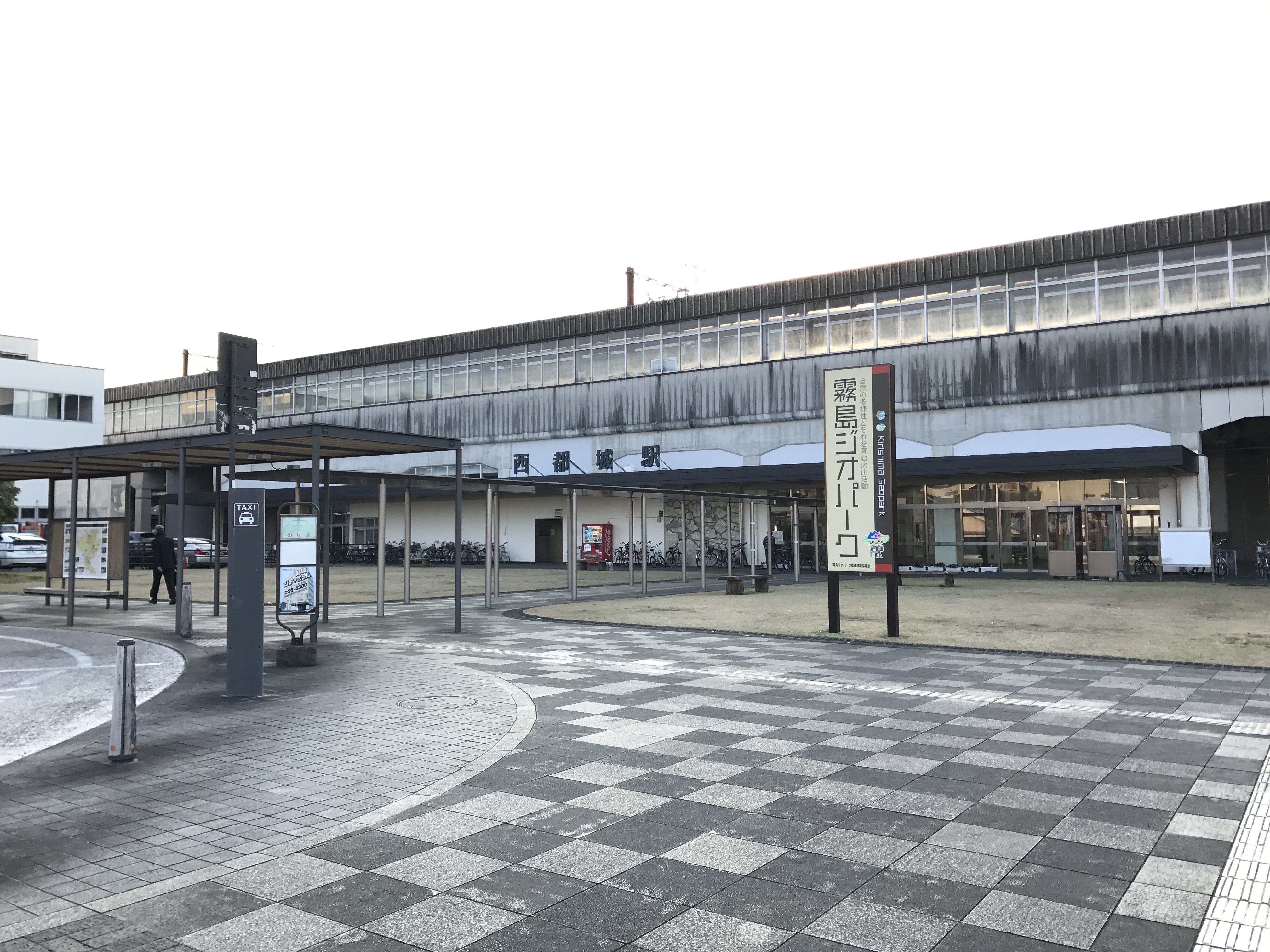 西都城駅駅舎